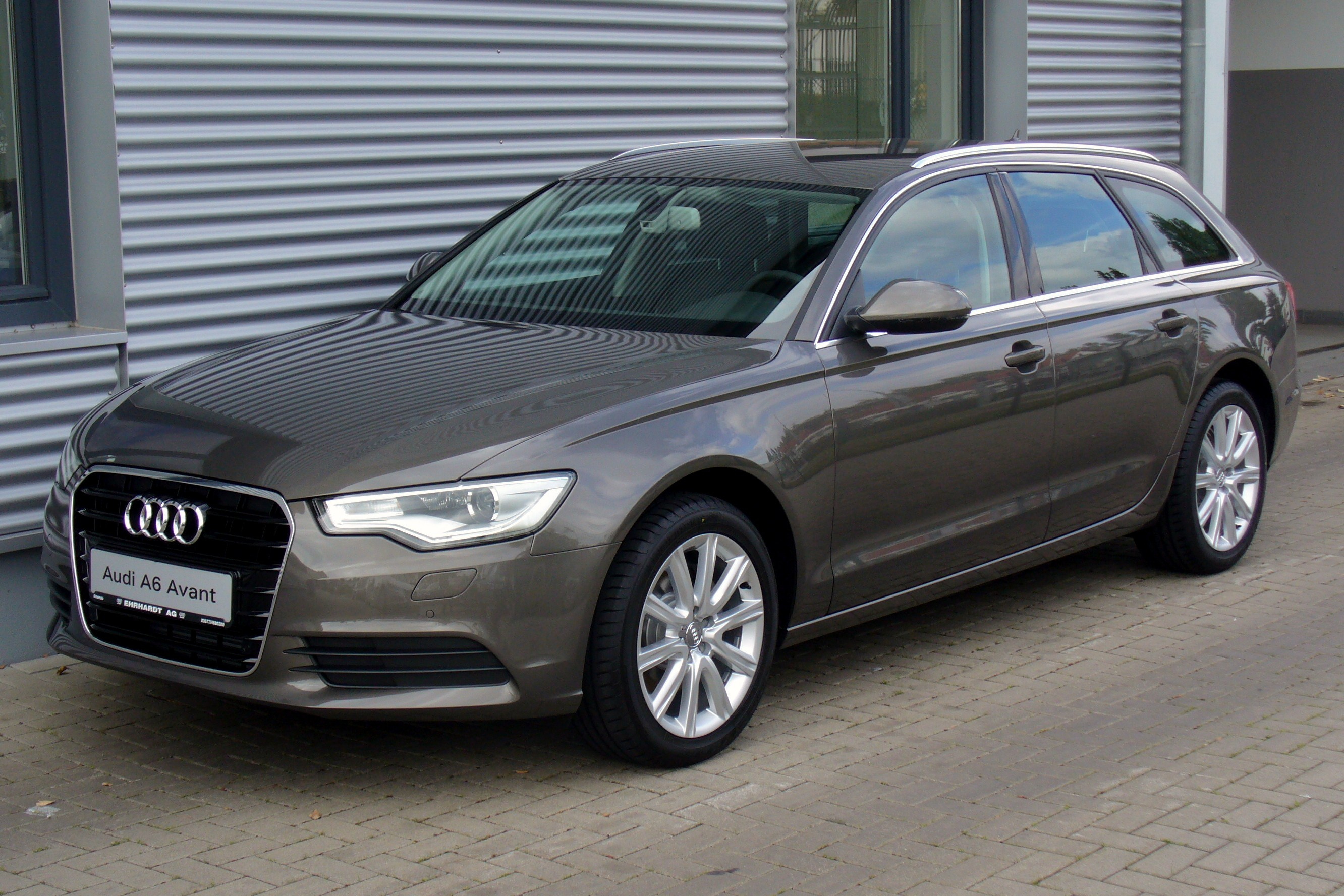 Audi A6 Avant